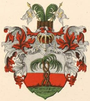 Palmstrauchi suguvõsa aadlivapp